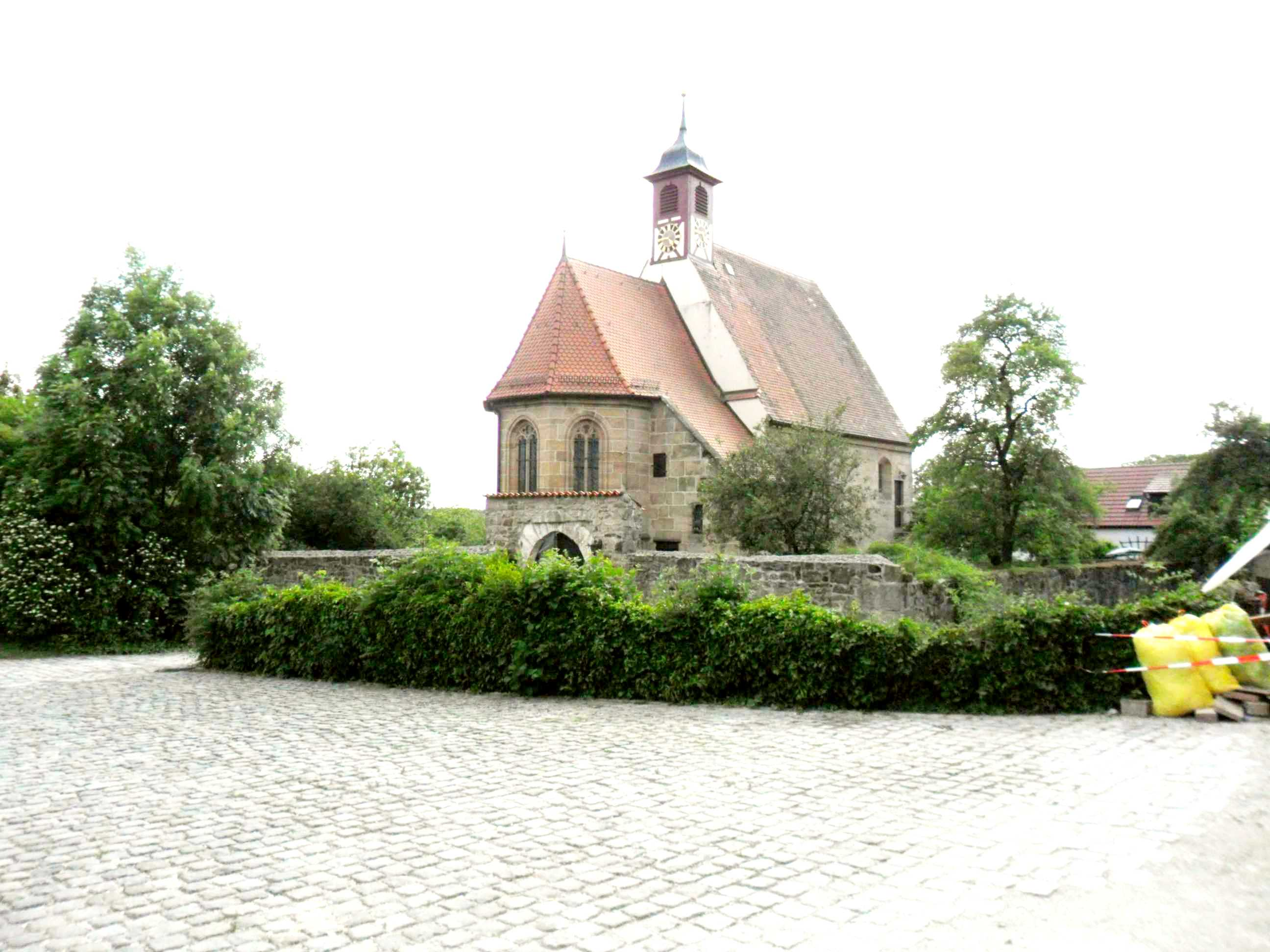 Puschendorf-Ansicht von Nordosten über Grabenbereich in ehemaliger Wasserburg-28052012